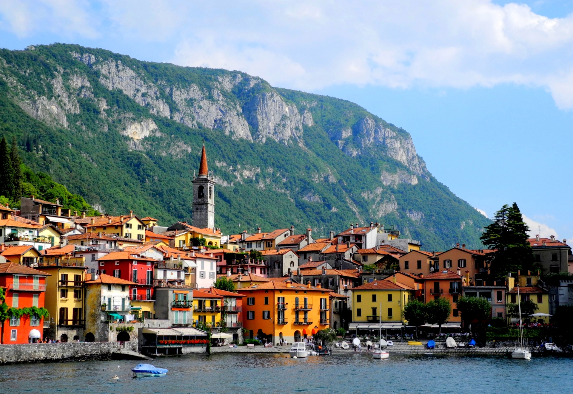 Varenna visto dall Lago